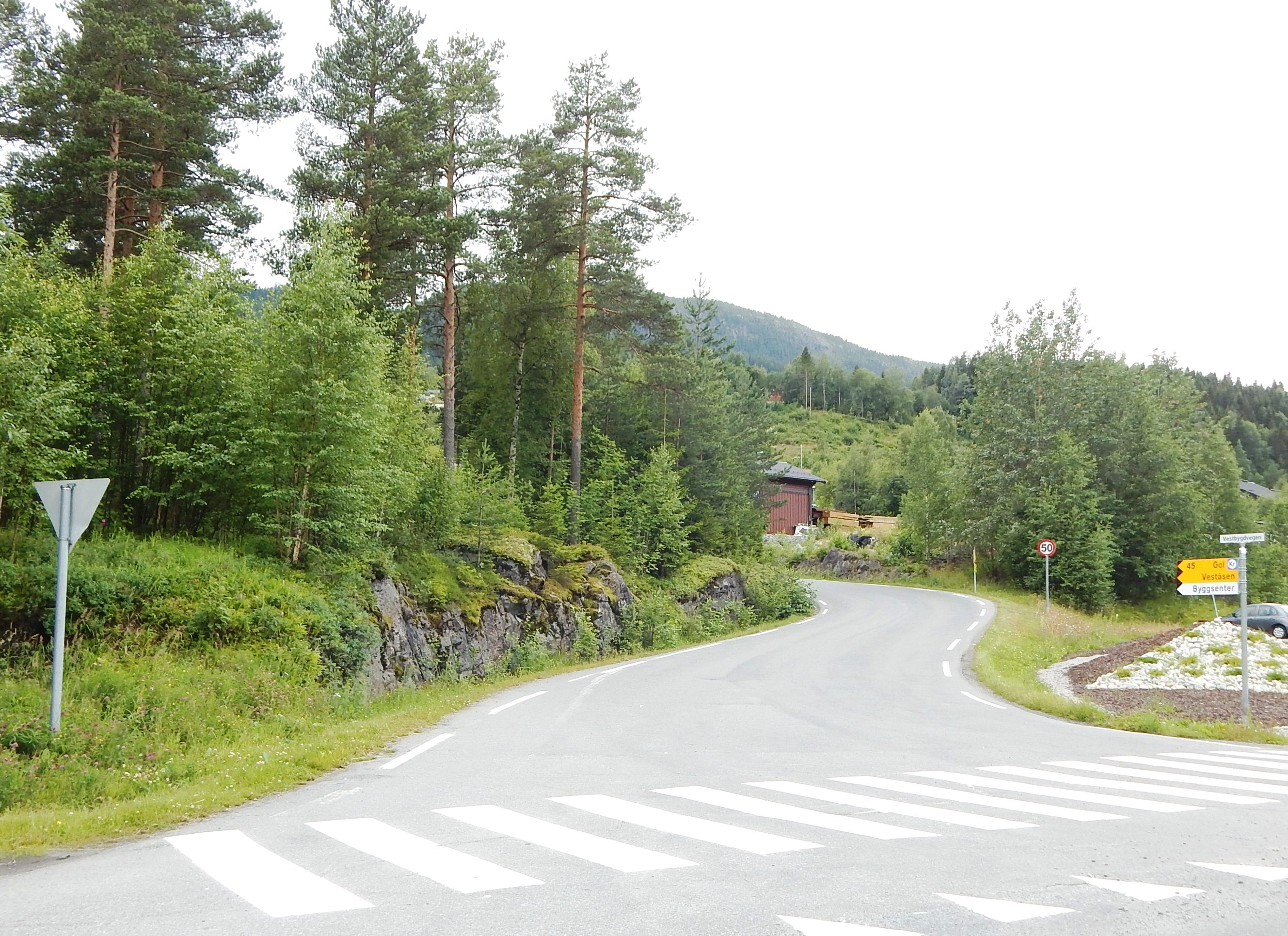 Vestbygdvegen på Bagn